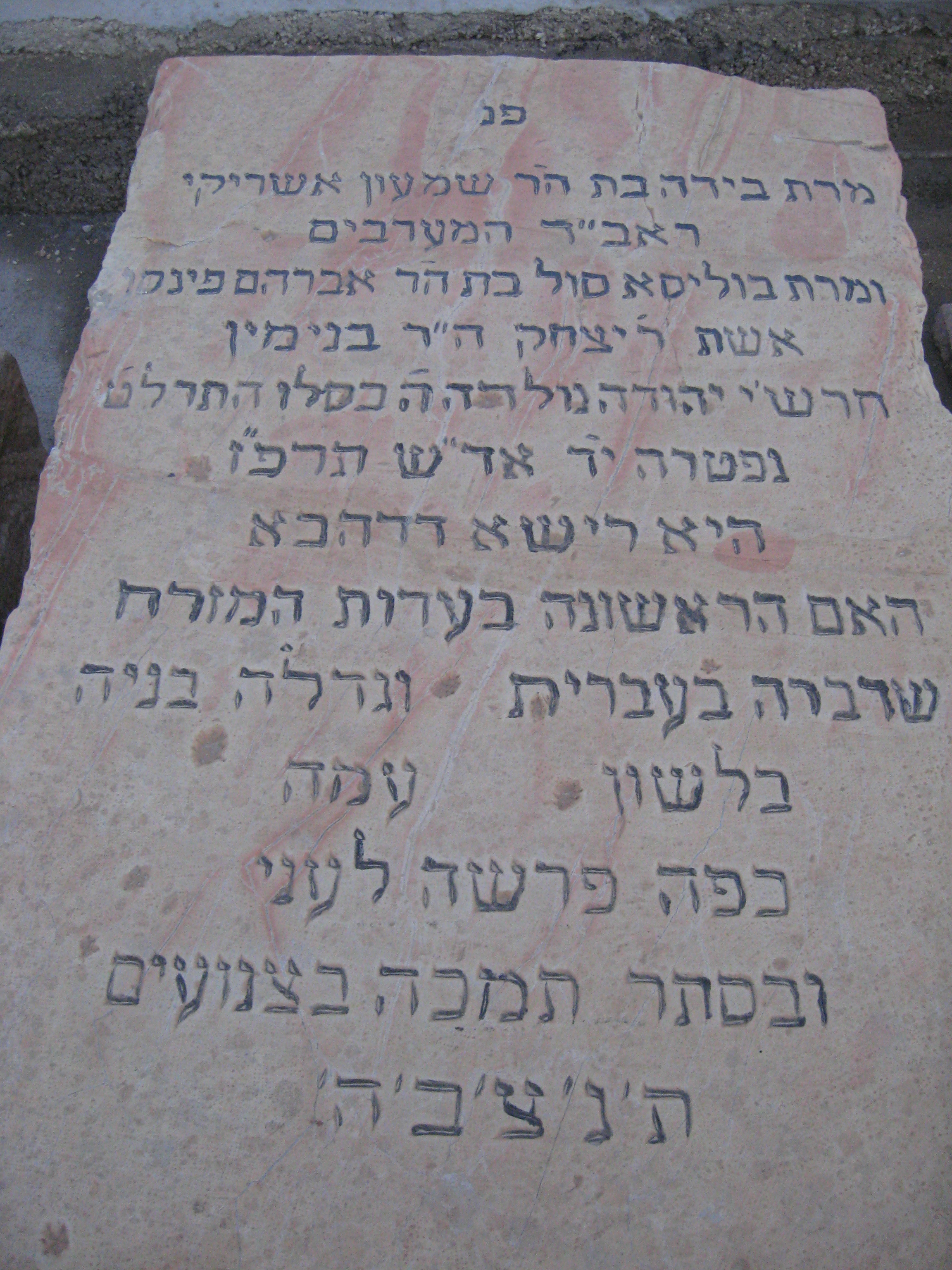 מצבתה של בידה יהודה